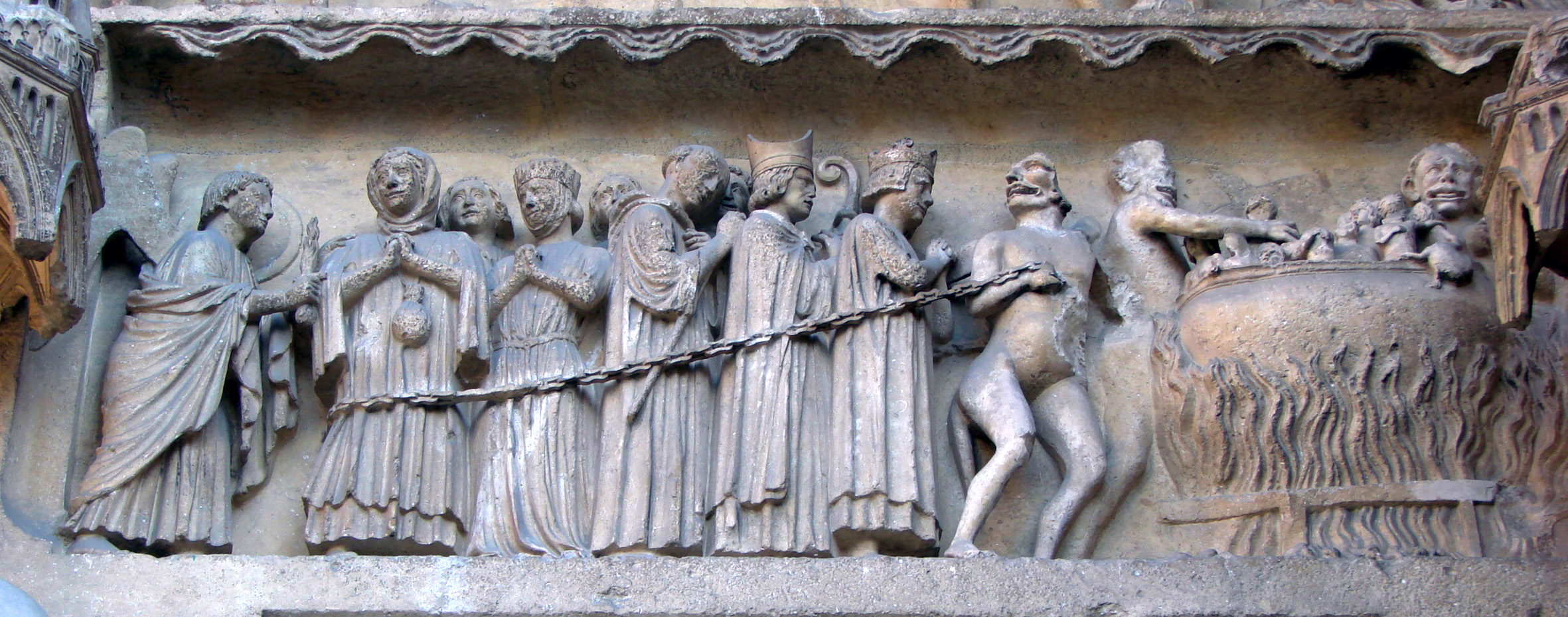 Cathédrale ND de Reims,portail Nord,le Jugement Dernier,les damnés.